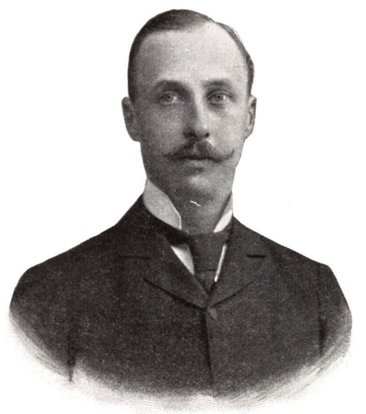 Návay Lajos (1870-1919) politikus